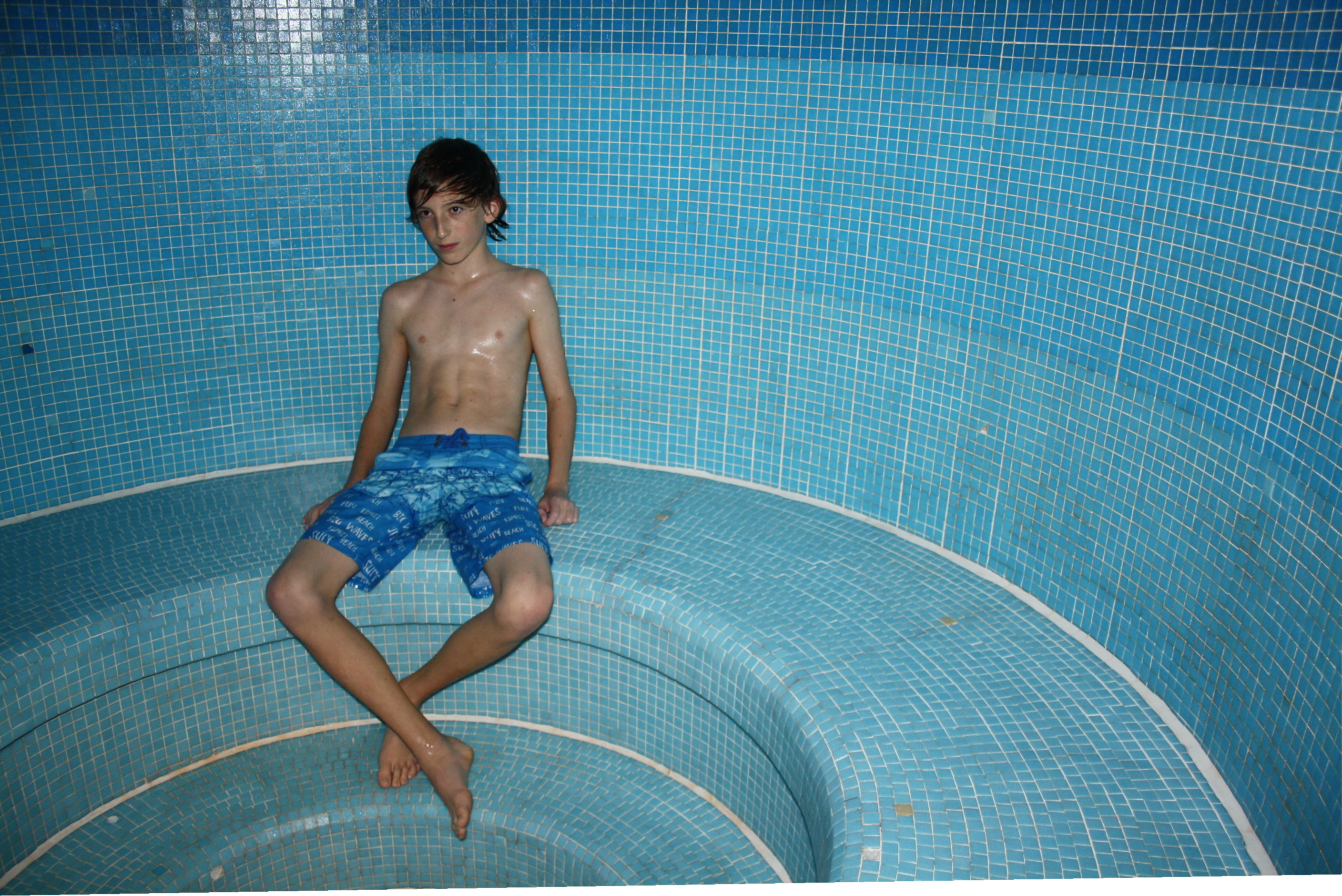 Dampfbad in einem Hotel.